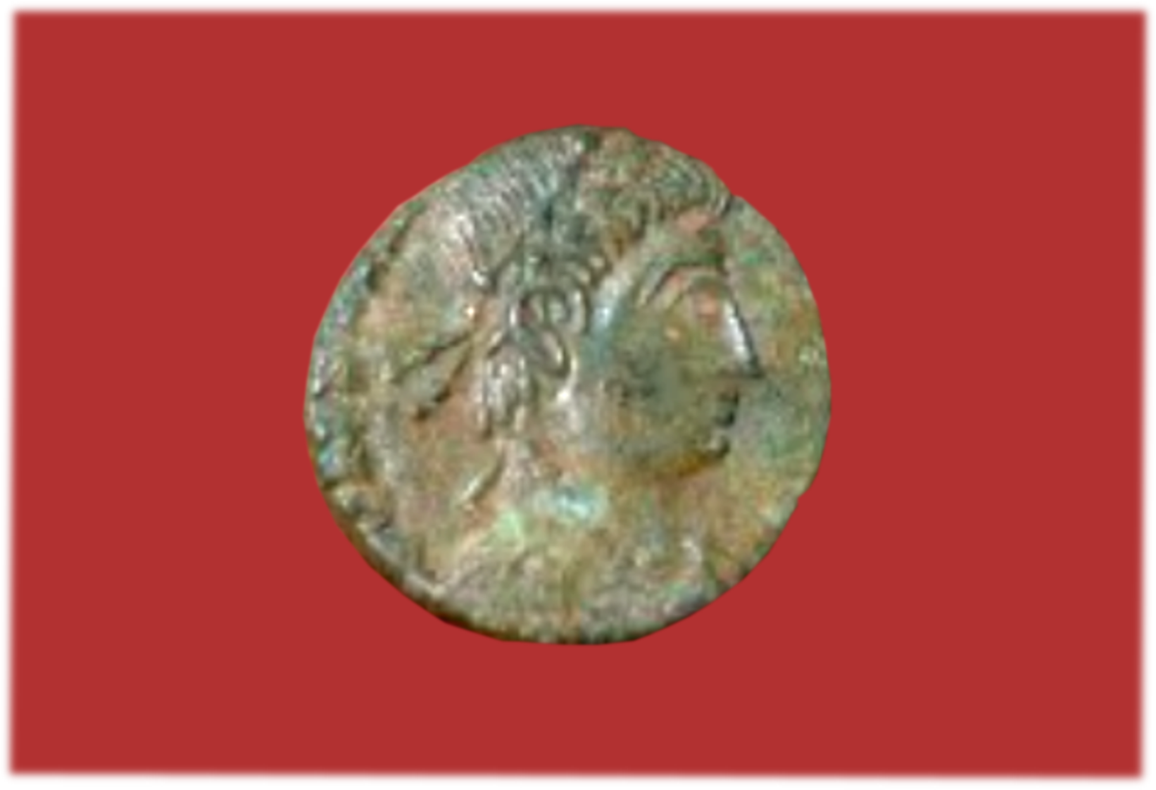 Römisches Bronze As des Constantius II., gefunden 2014 beim Wachturm Möhlin-Untere Wehren (CH).